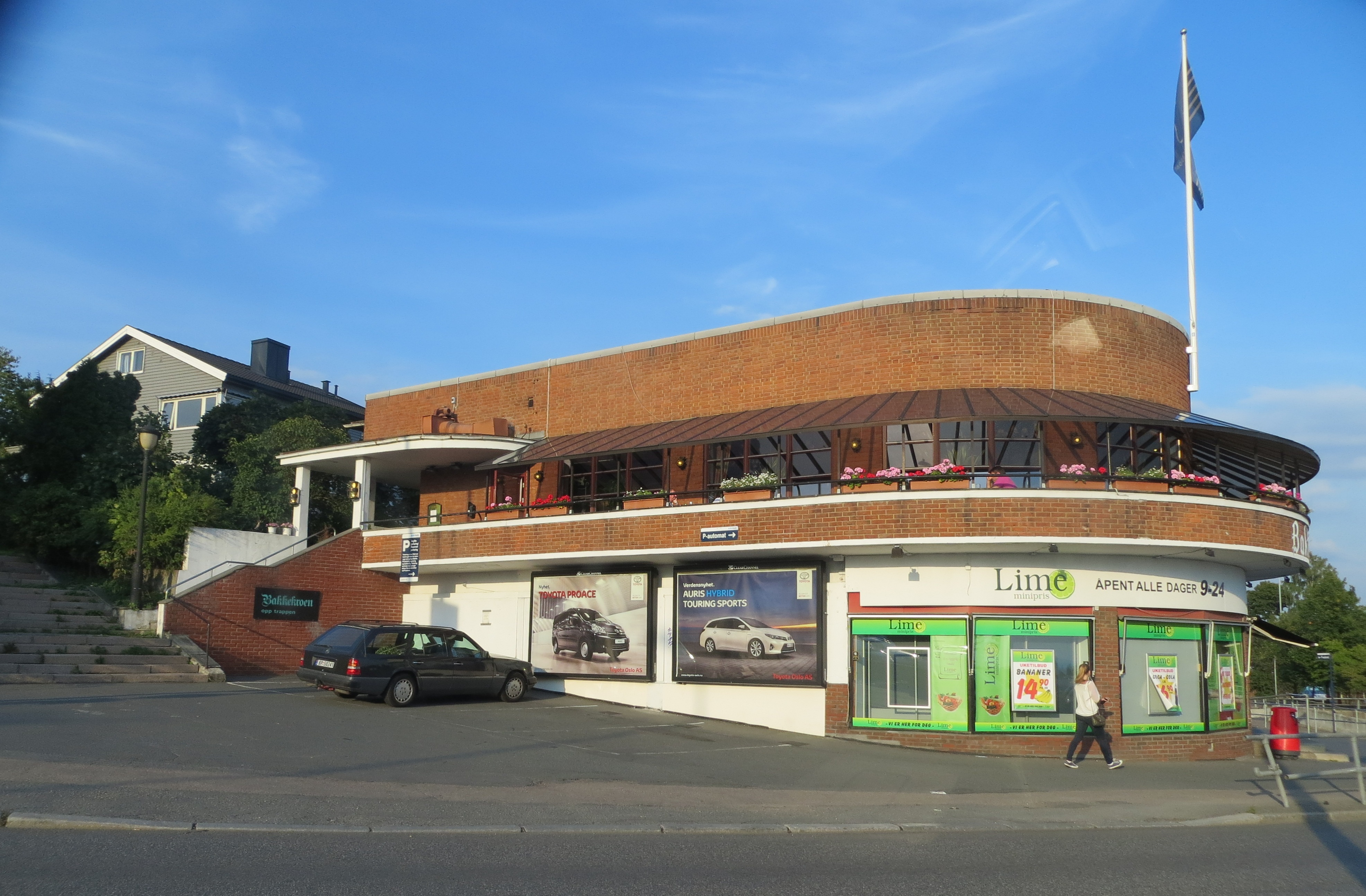 Bakkekroa, i Smestadkrysset, Oslo